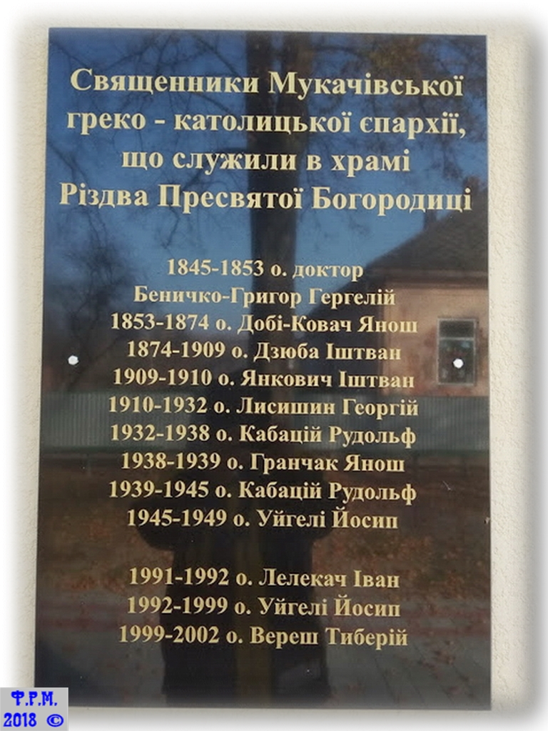 Хронрологічний список священників церкви с. Вовкове (мармурова табичка на церкві )